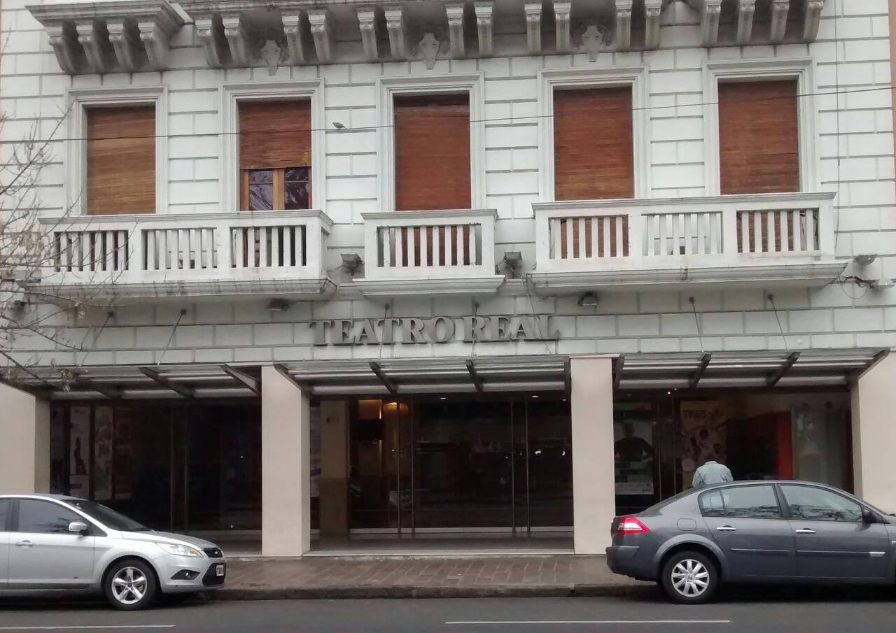 Fachada del Teatro Real.